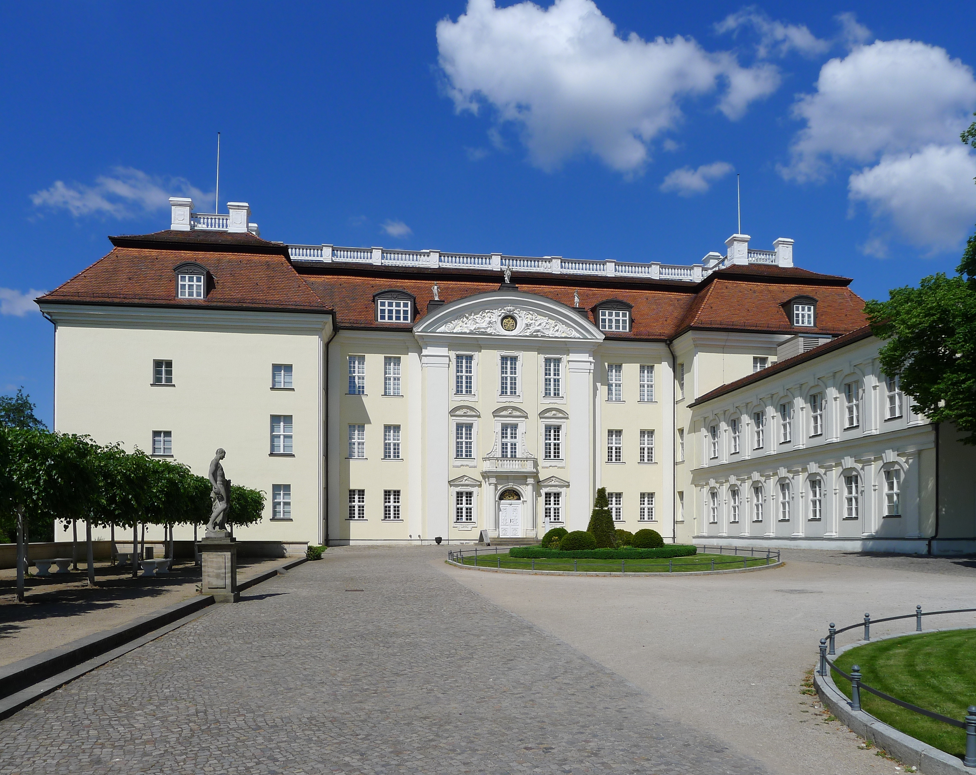 Portalseite des Schlosses fotografiert vom Schlosshof